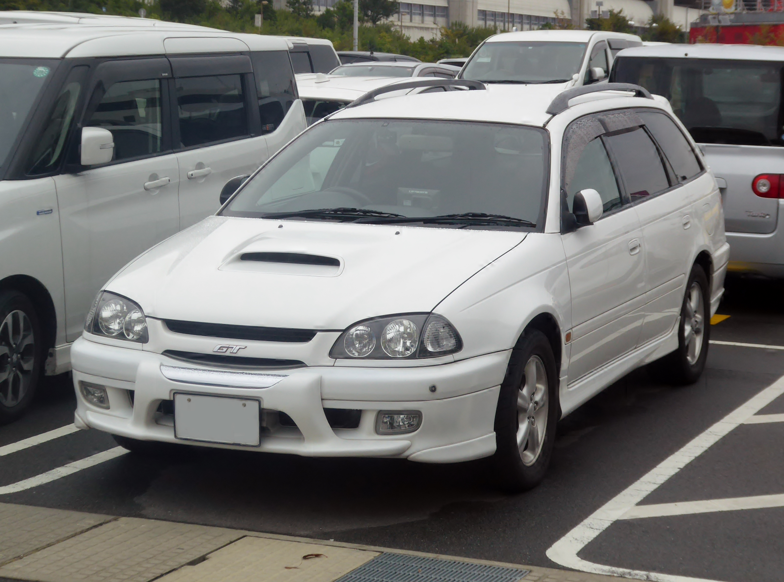 G-ST215W型トヨタ・カルディナGT-Tをフロントから撮影。